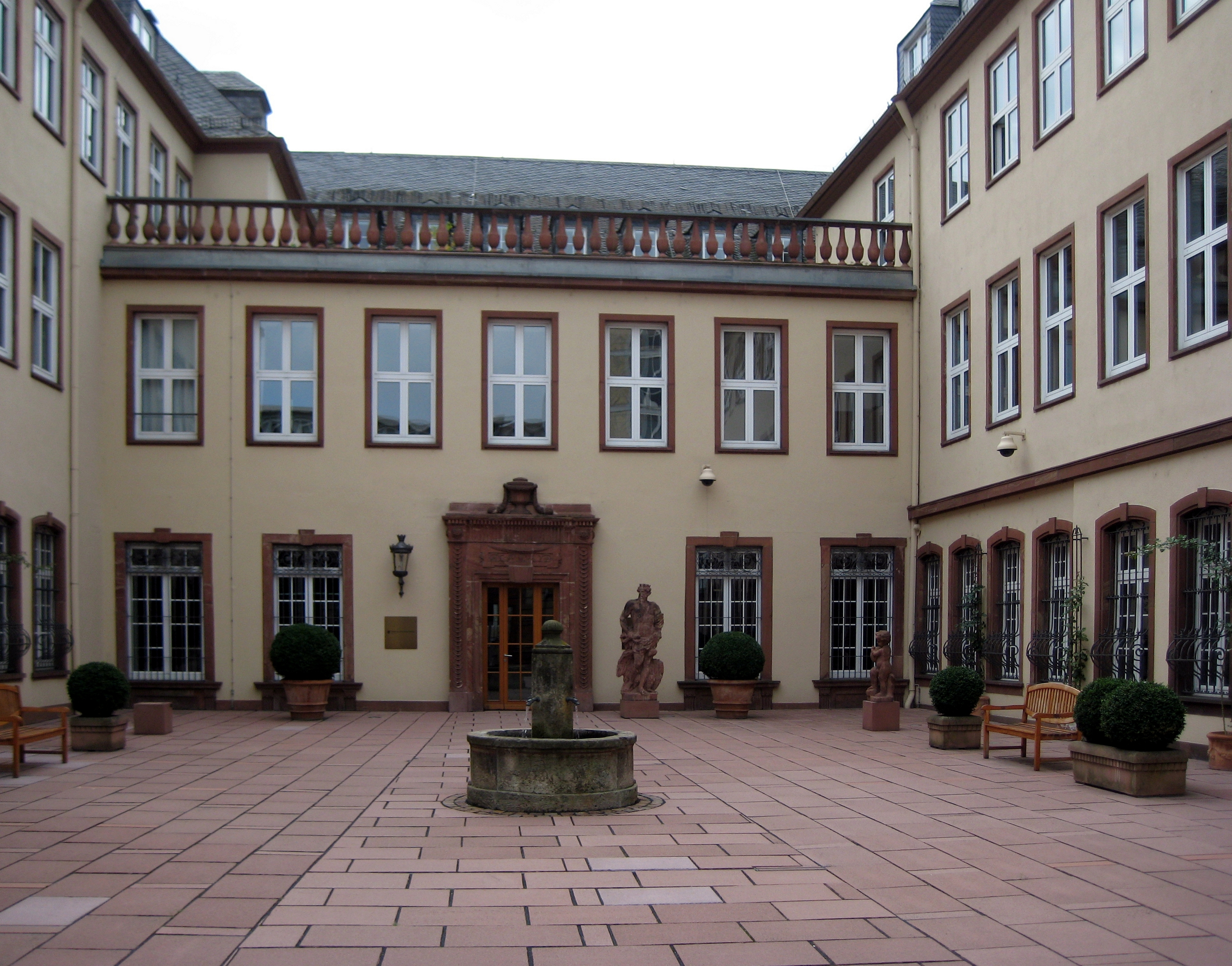 Gebäude der ehemaligen Bethmann-Bank Frankfurt am Main, Bethmannstraße. Anmerkungen:Das Foto wurde vom Bürgersteig der Bethmannstraße aus aufgenommen (öffentliche Ansicht); das Gebäude wurde im 19. Jhd. errichtet.